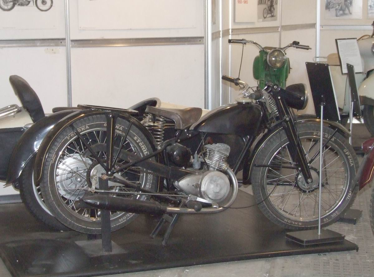 Polish Sokół 125 motorcycle, 1947-1950